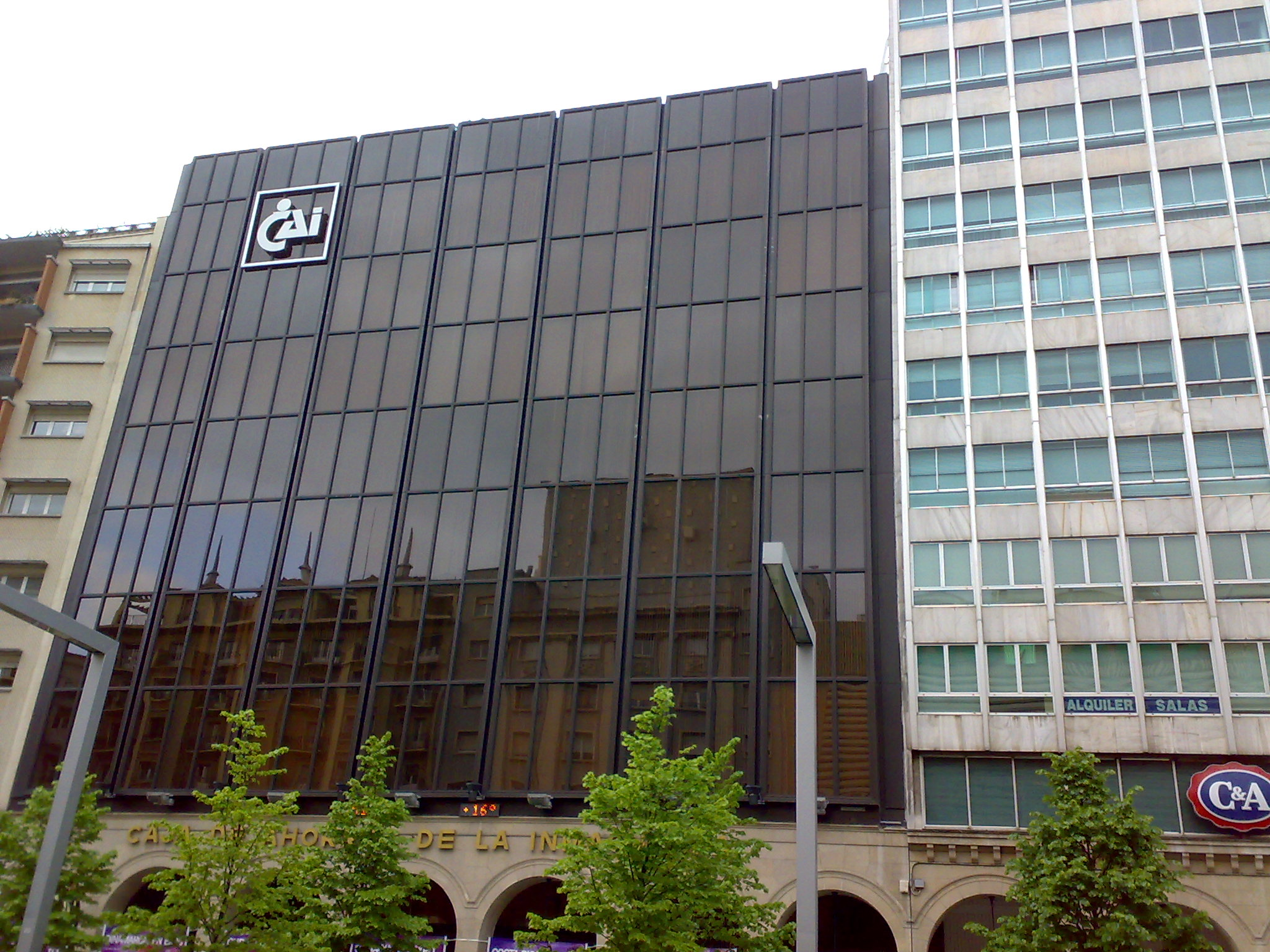 Oficinas centrales CAI en Zaragoza